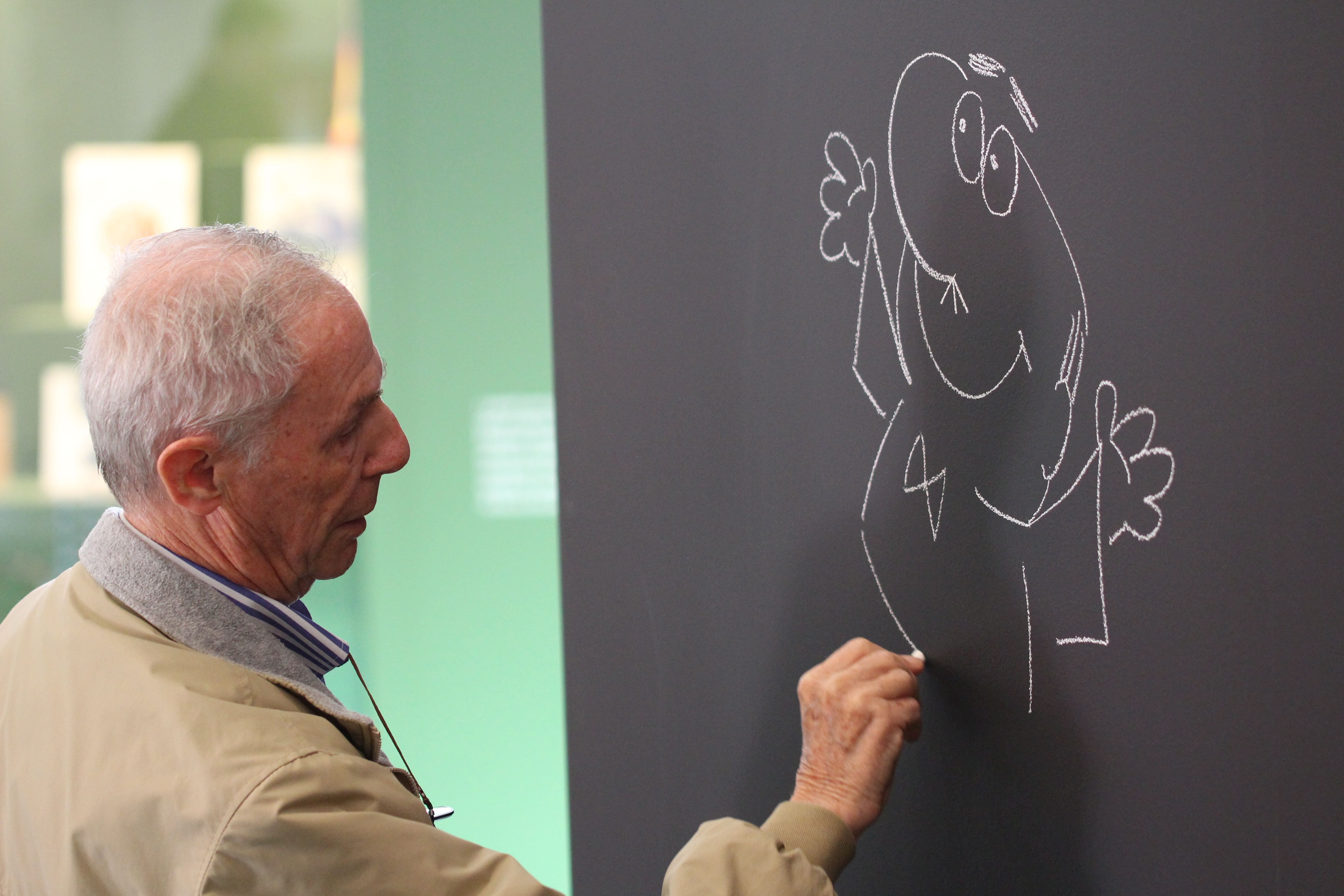 Bruno Bozzetto disegna il Signor Rossi all'inaugurazione della mostra "Giro Giro Tondo, Design for children" alla Triennale di Milano, 2017